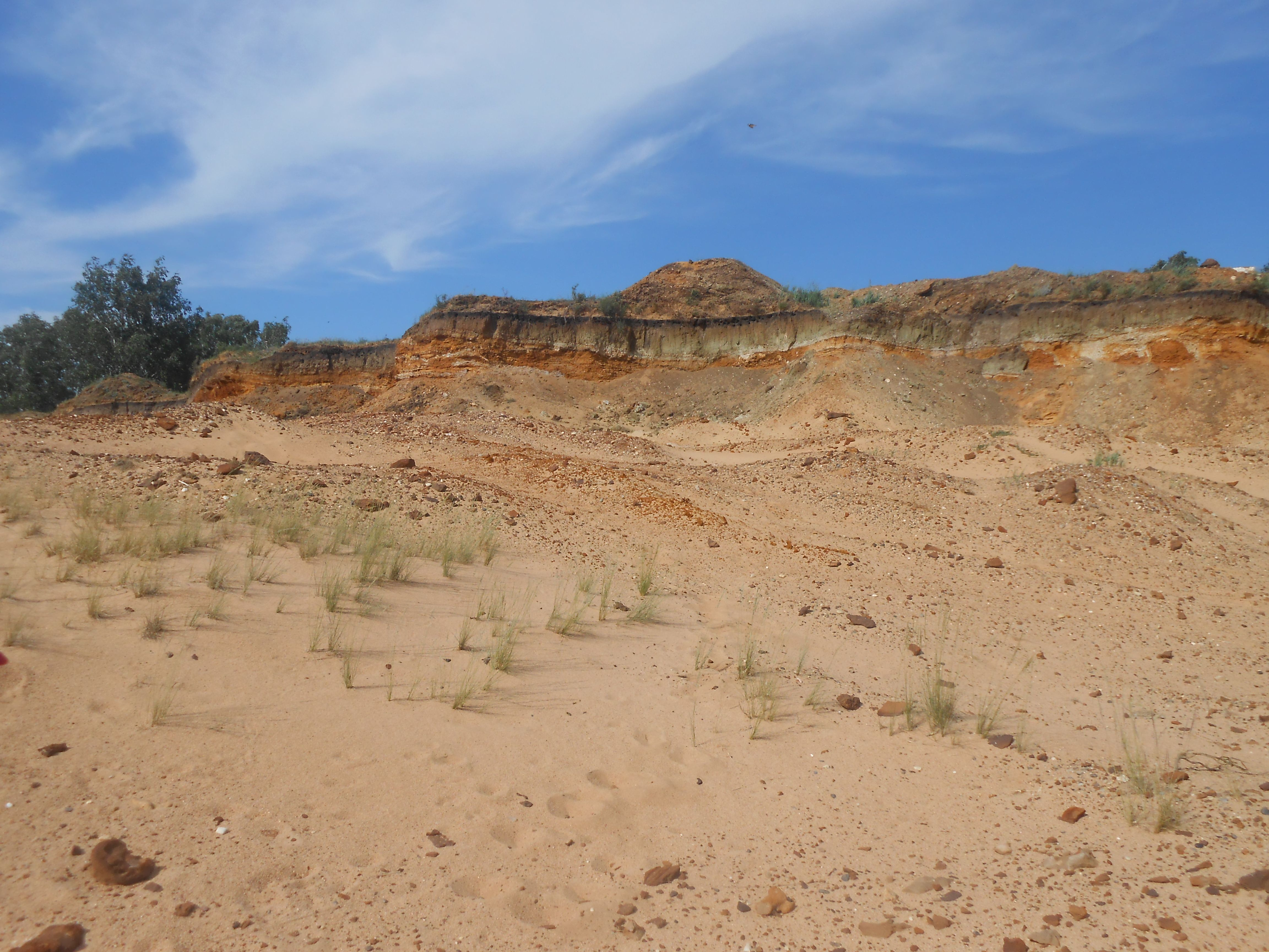 Пески в Хайбуллинском районе РБ